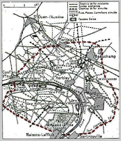 Plan de détail avec lignes de chemin de fer, bâtiments